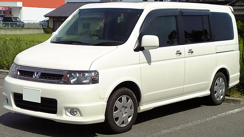 2代目ホンダ・ステップワゴン（後期型・スパーダ）